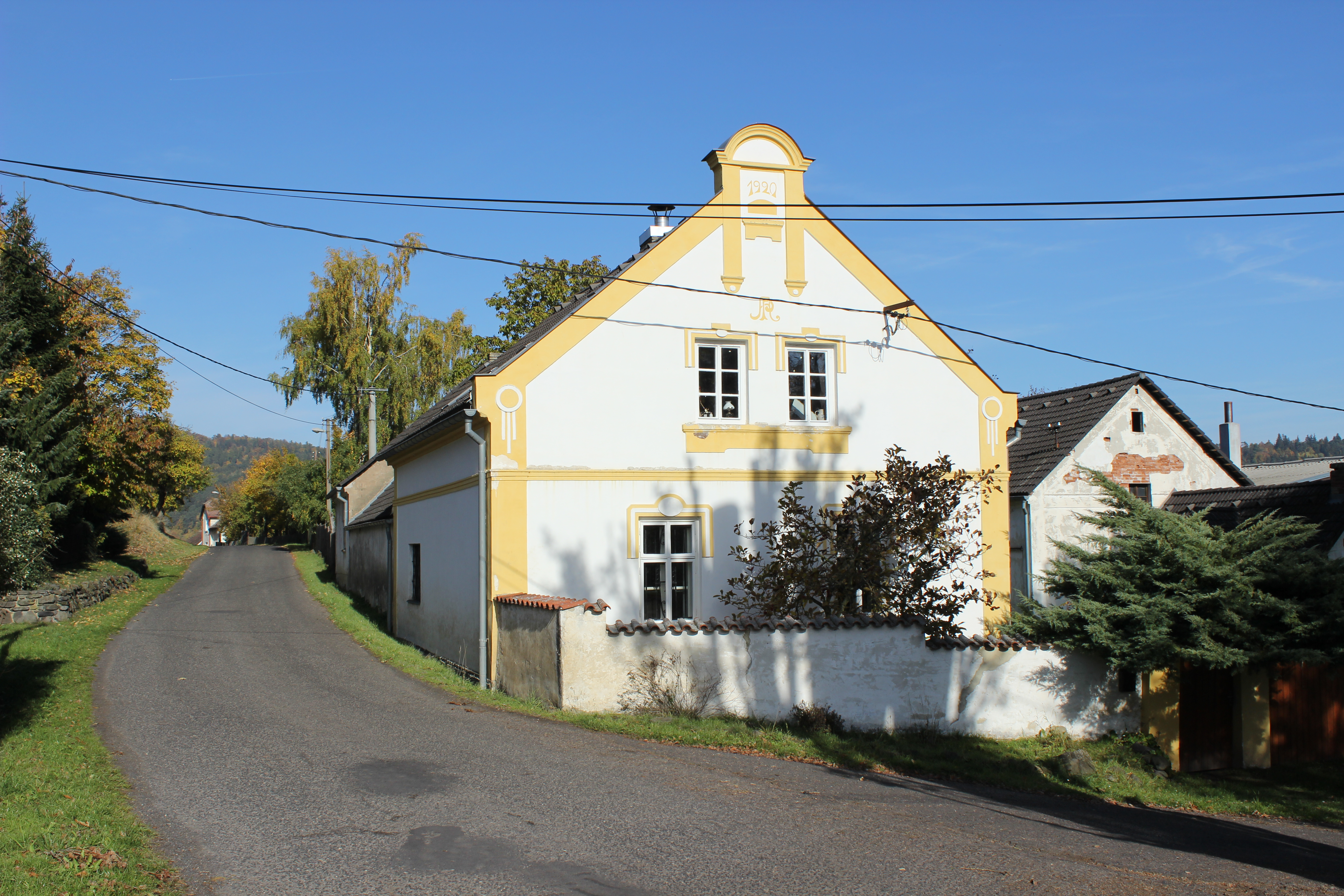 Dům číslo popisné 14 v Jeřeni, části Valče.